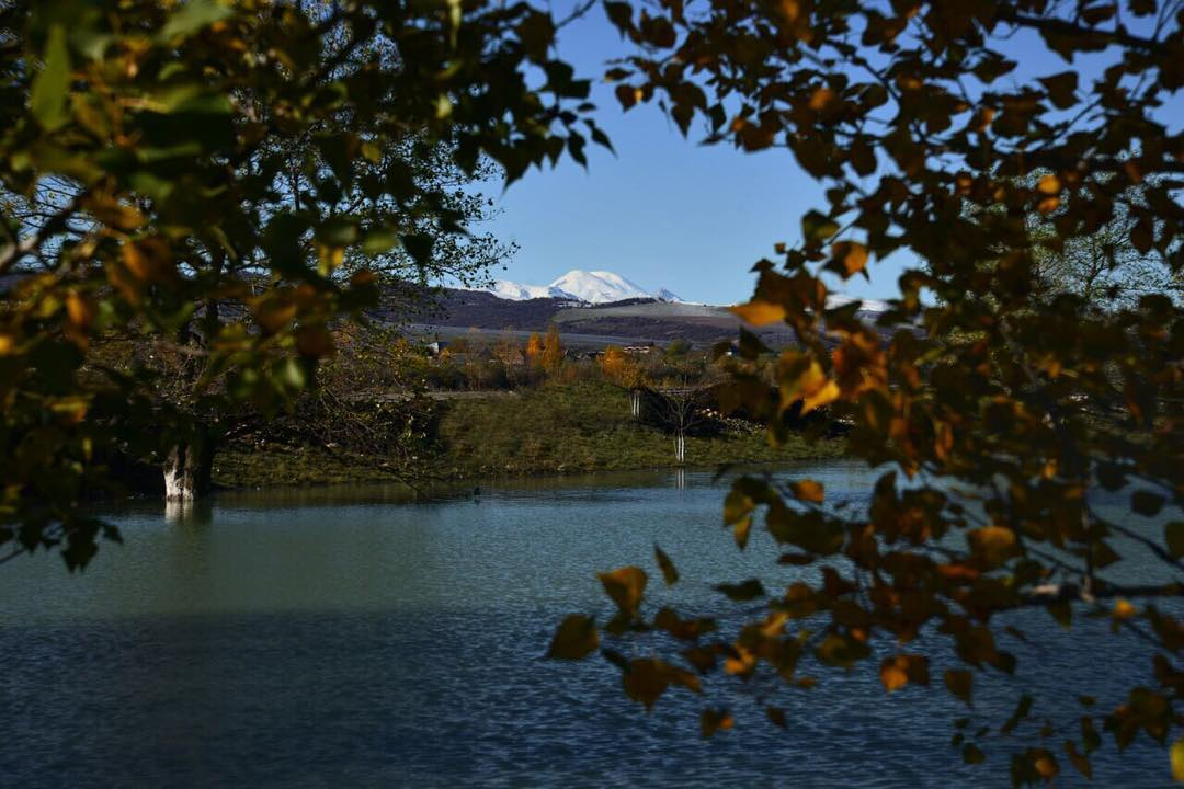 Вид на Эльбрус из городского парка Баксана